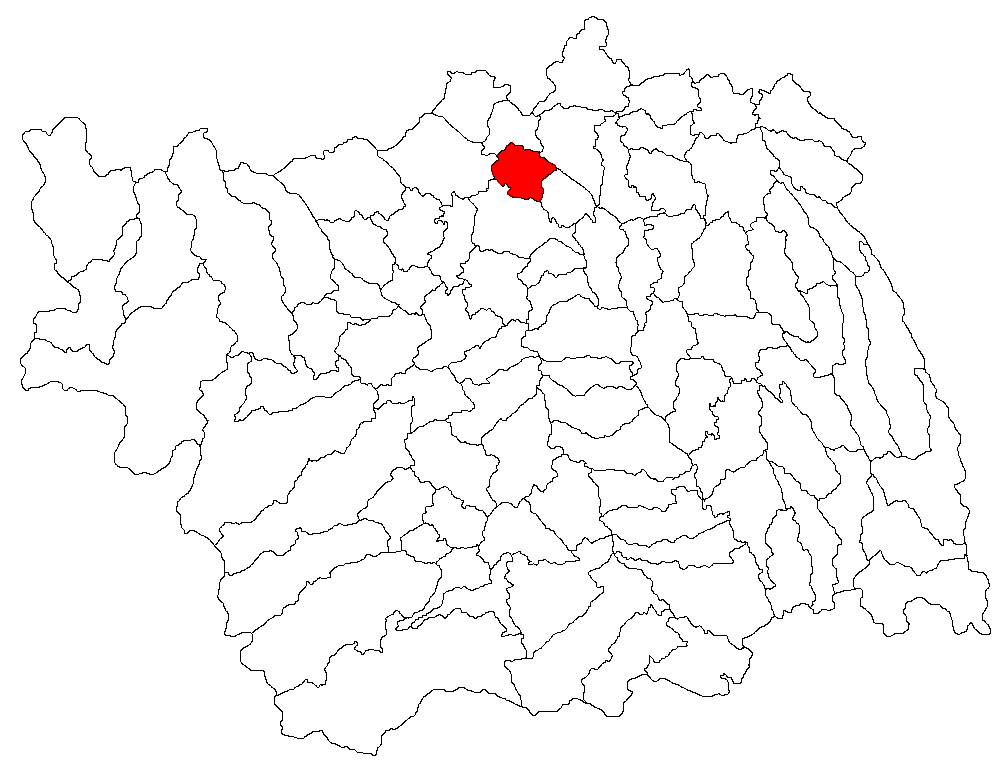 Categorie:Hărţi ale judeţului Bacău